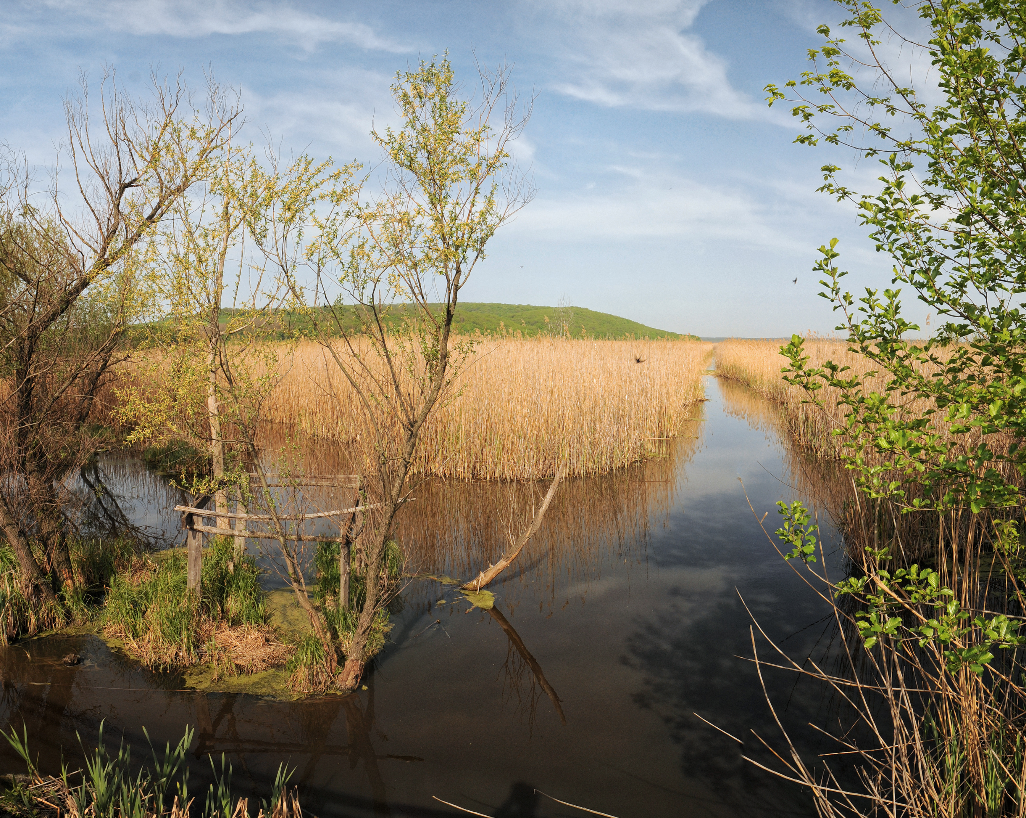 Юрова гора з Ірдинських боліт